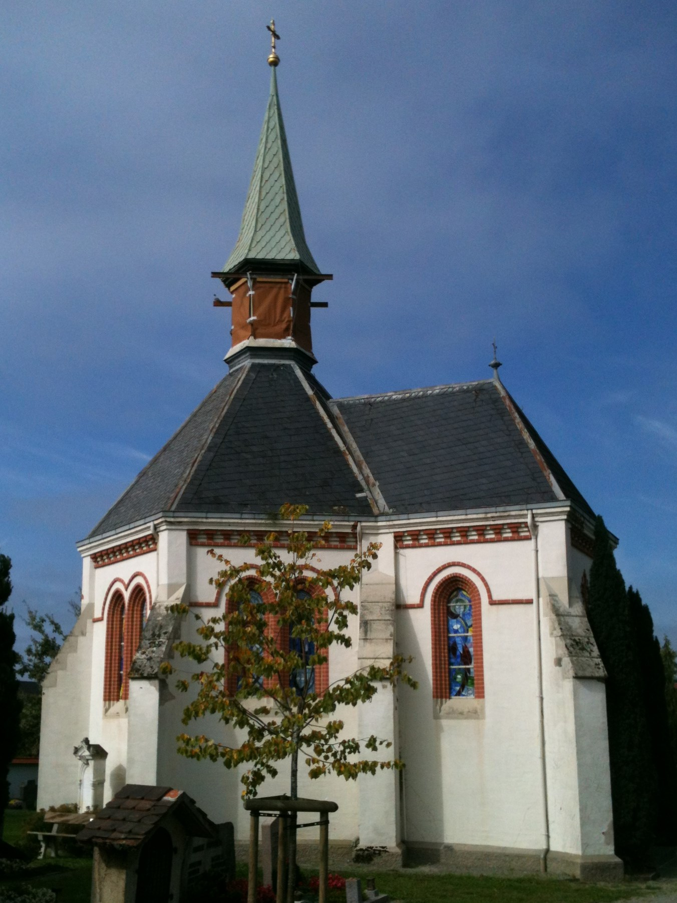 Deutschland - Baden-Württemberg - Bodenseekreis - Tettnang, Friedhofstraße: ehemalige Friedhofkapelle, heute Gedenkstätte für die Gefallenen des Ersten Weltkriegs